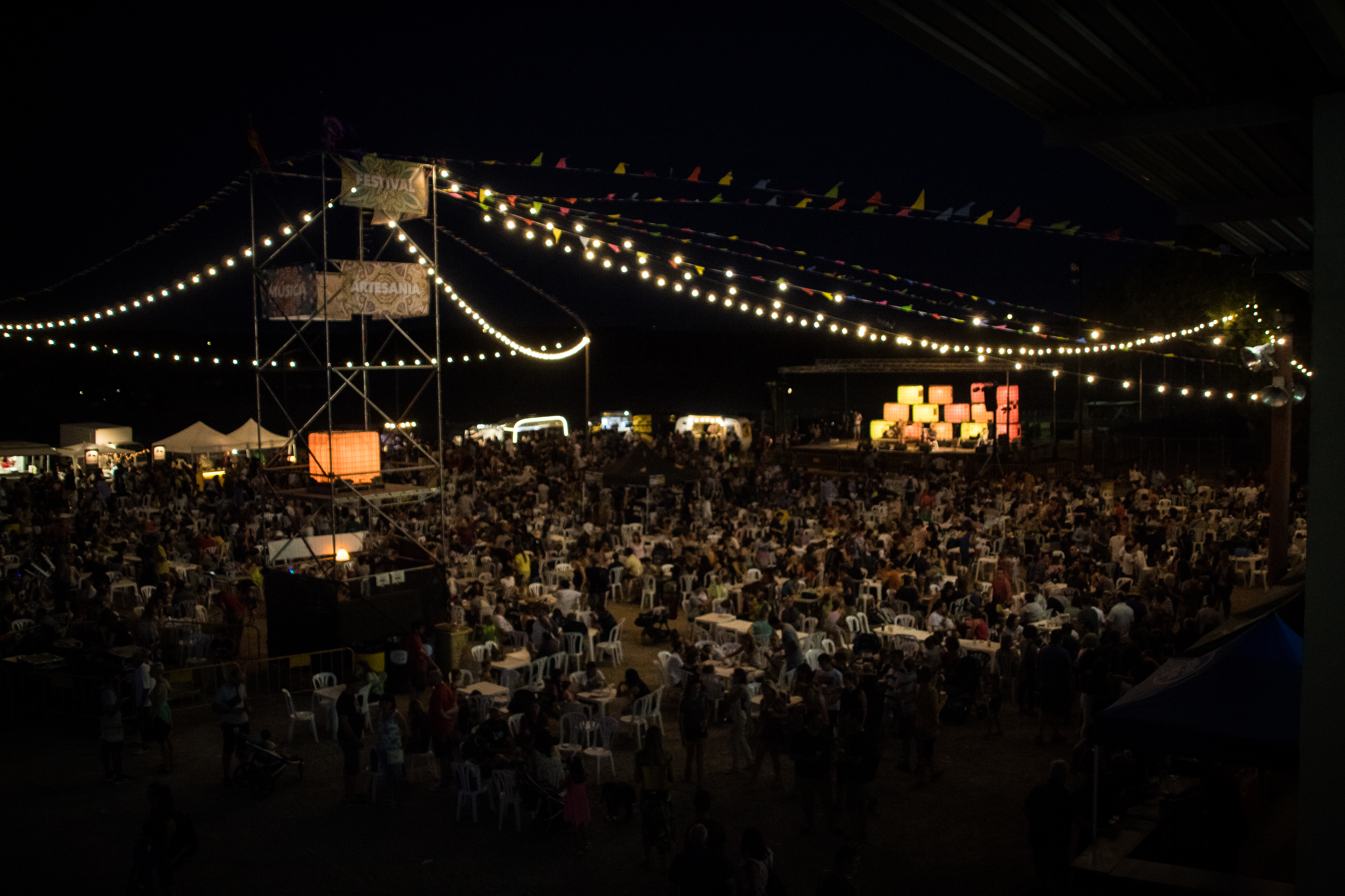 Sandra Bautista - Paupaterres